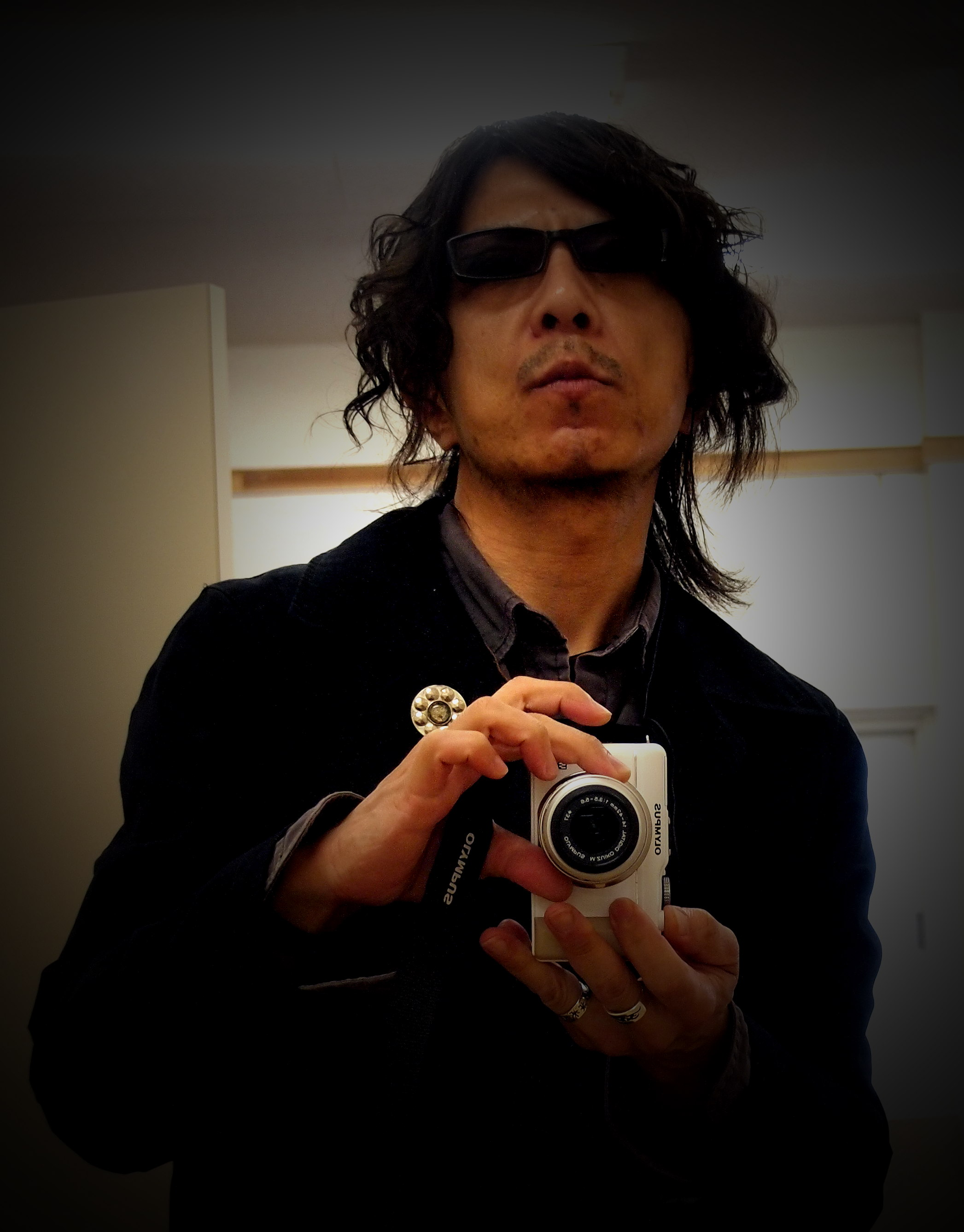 葛飾ロビンソン